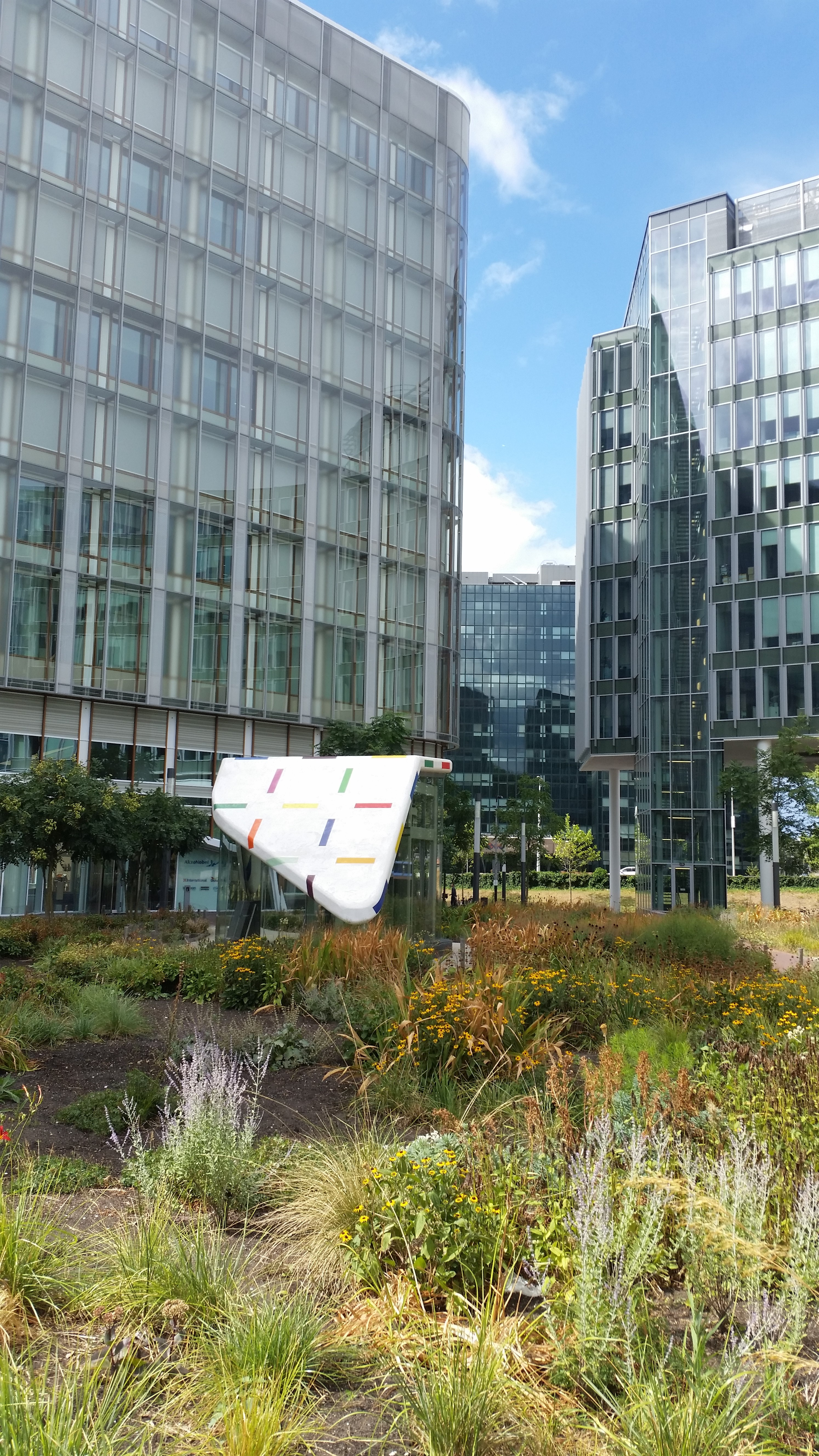 Een kunstwerk van Steven Aalders vormt het dak van een liftschacht naar de ondergrondse parkeergarage van Stibbe; Beethovenplein/Beatrixpark, Amsterdam-Zuid